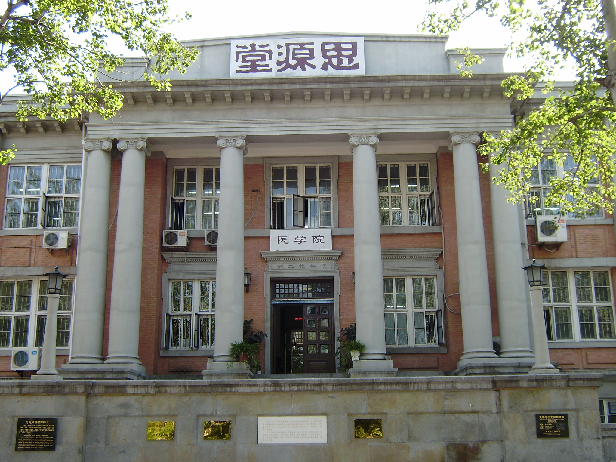 天津南开大学思源堂